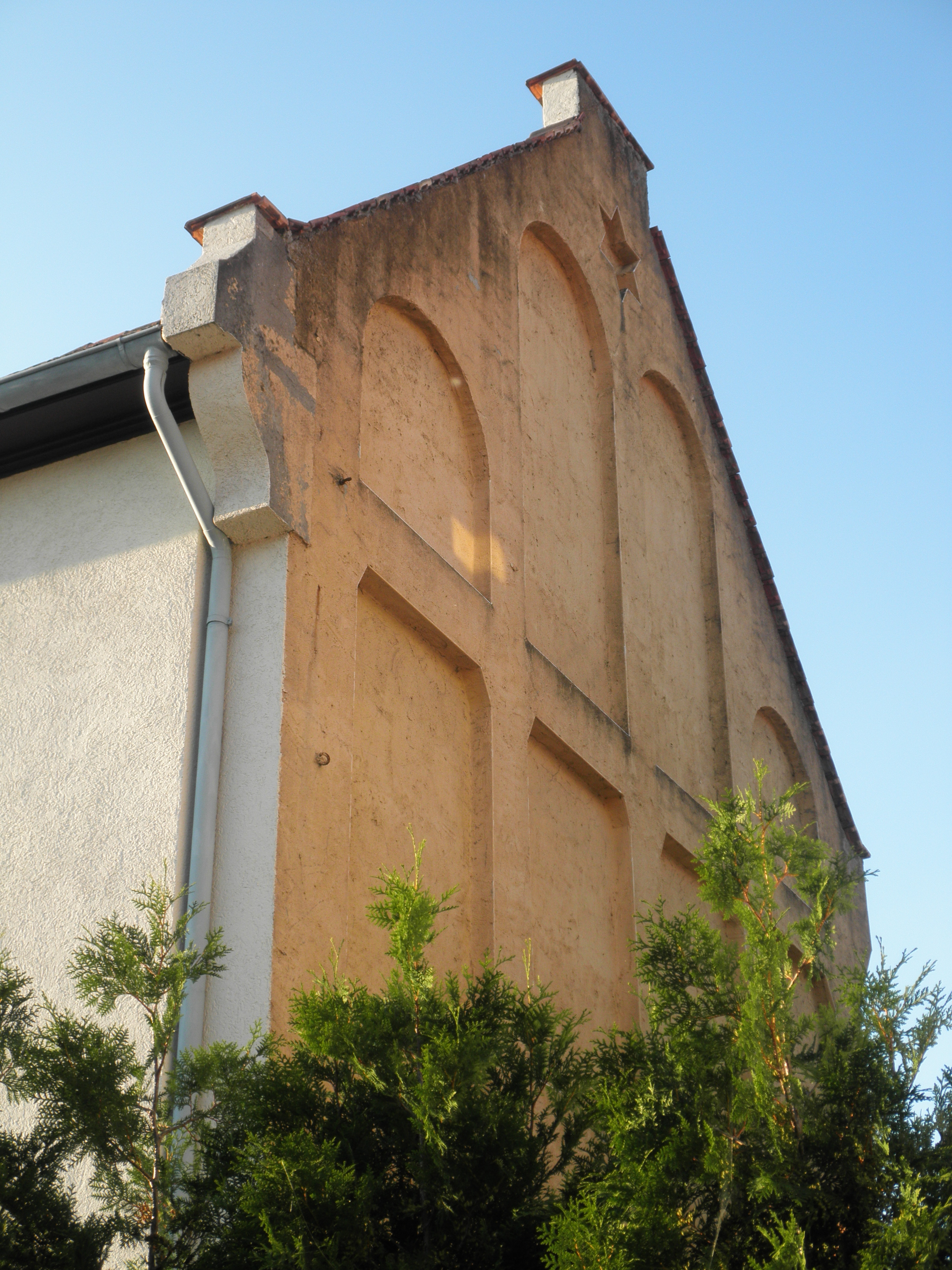 Zwingenberg: eksa sinagogo Wiesenstraße 5